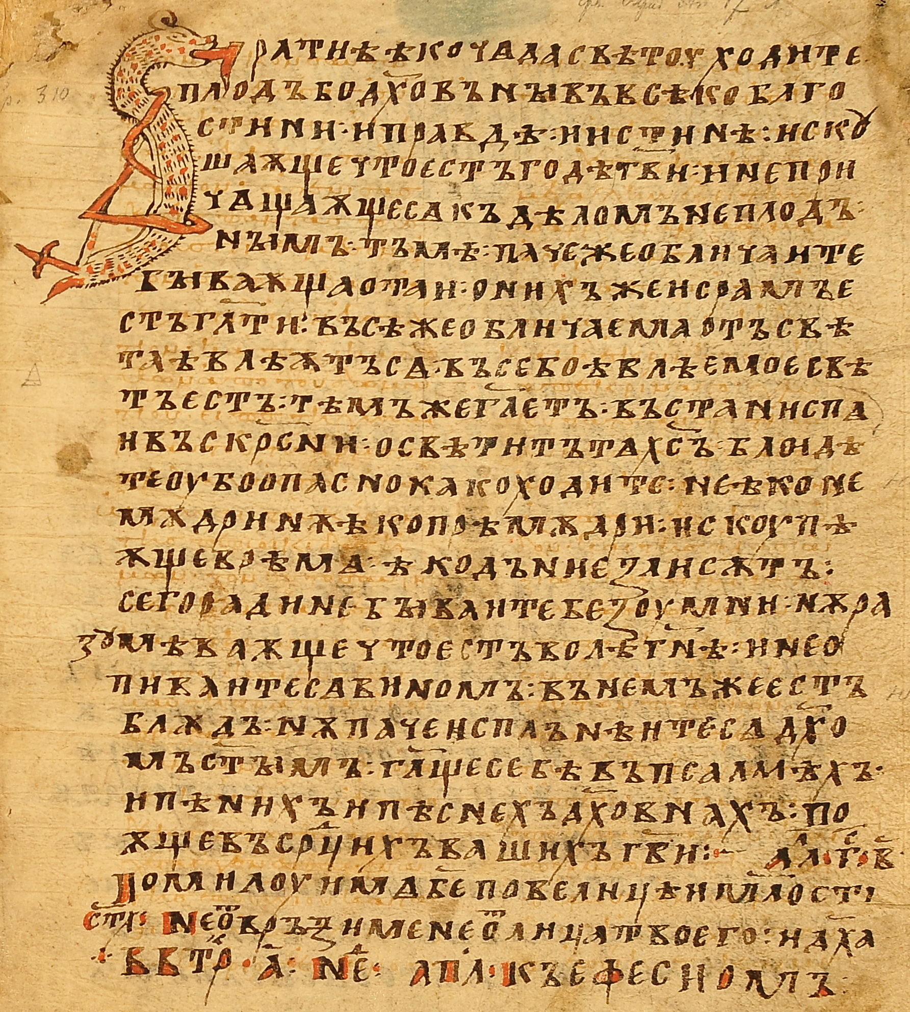 Слепченски апостол